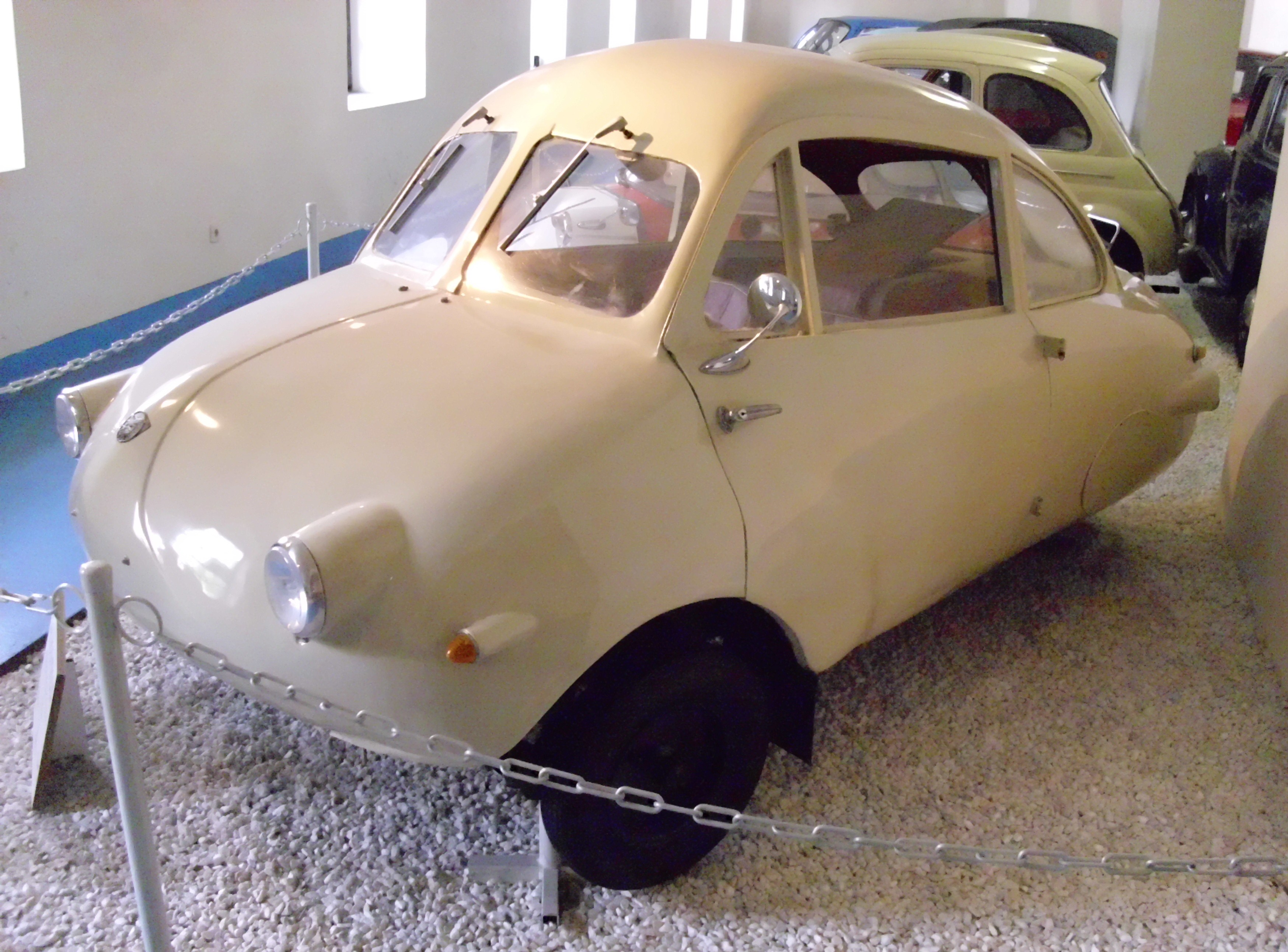 Felber Möve 1954 im Automobil-Museum Aspang